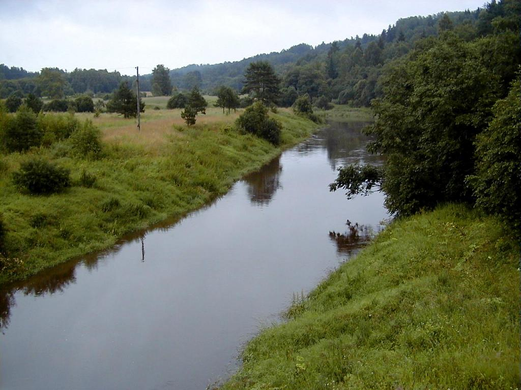 Abava pie Veģiem 2001-07-21